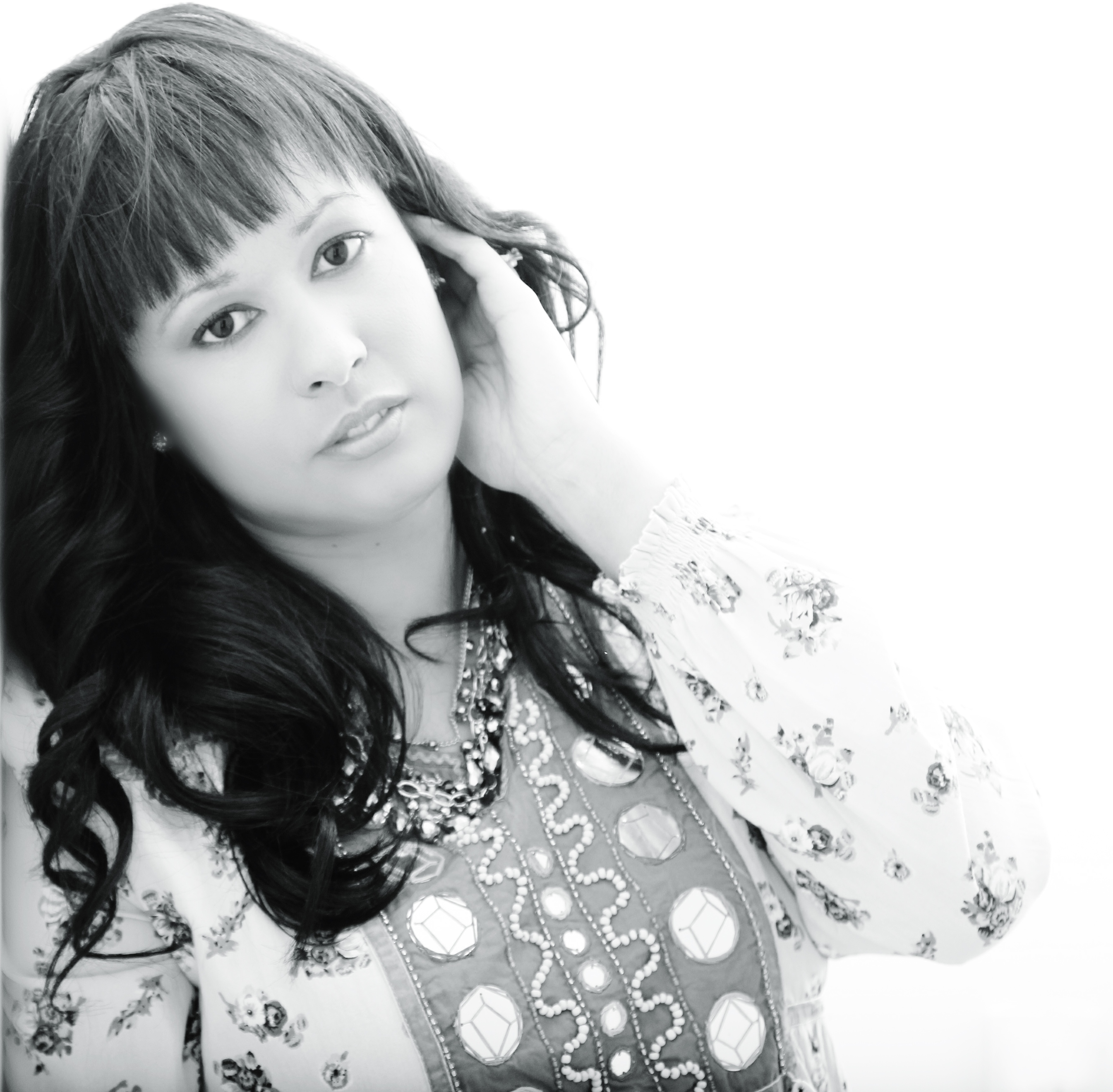 escritora